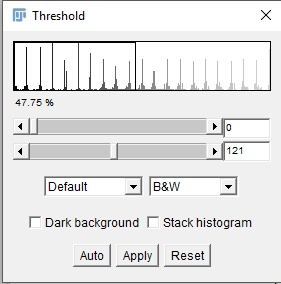 Histograma da imagem da escala de tons de cinza